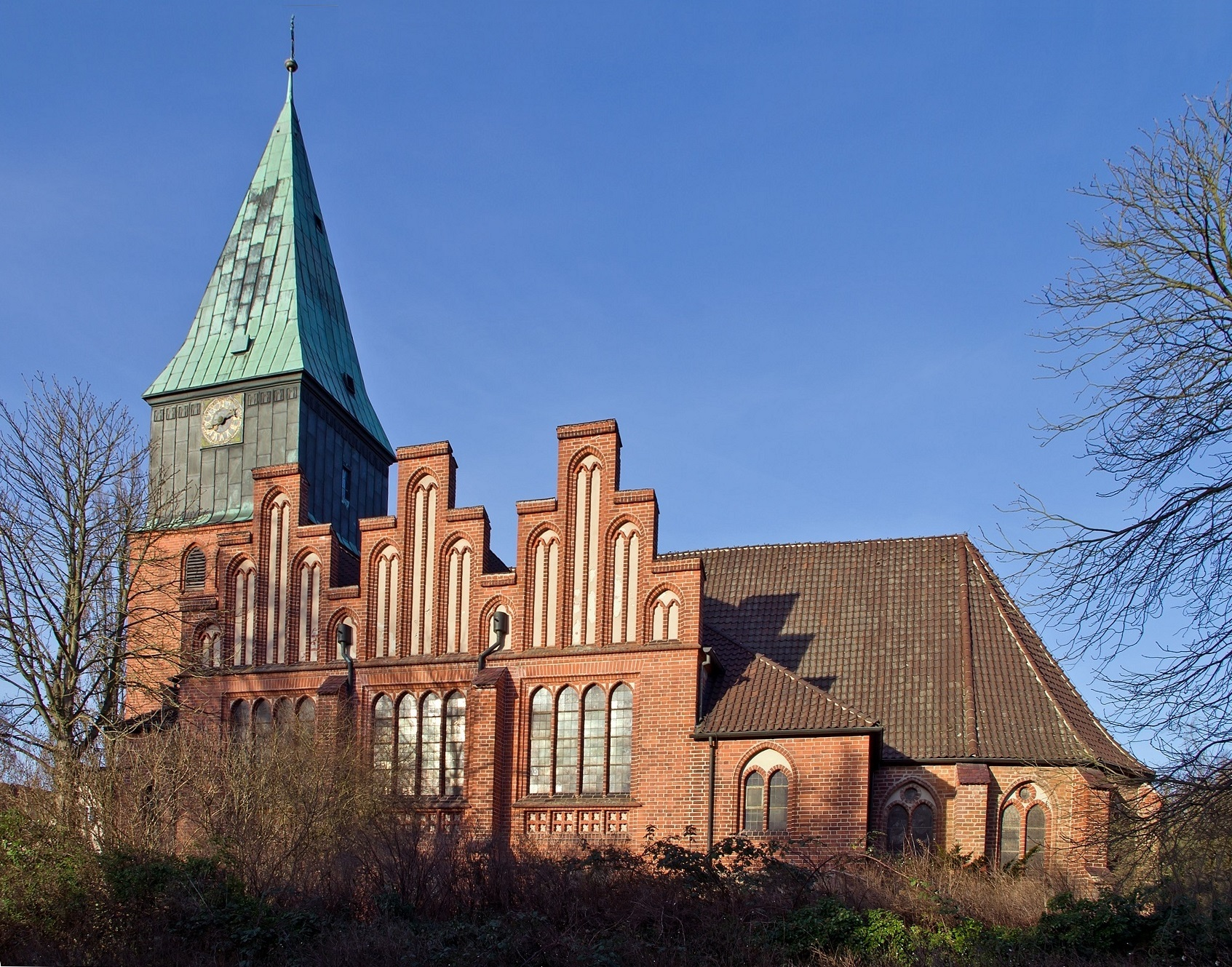 St.-Michaels-Kirche in Schnega